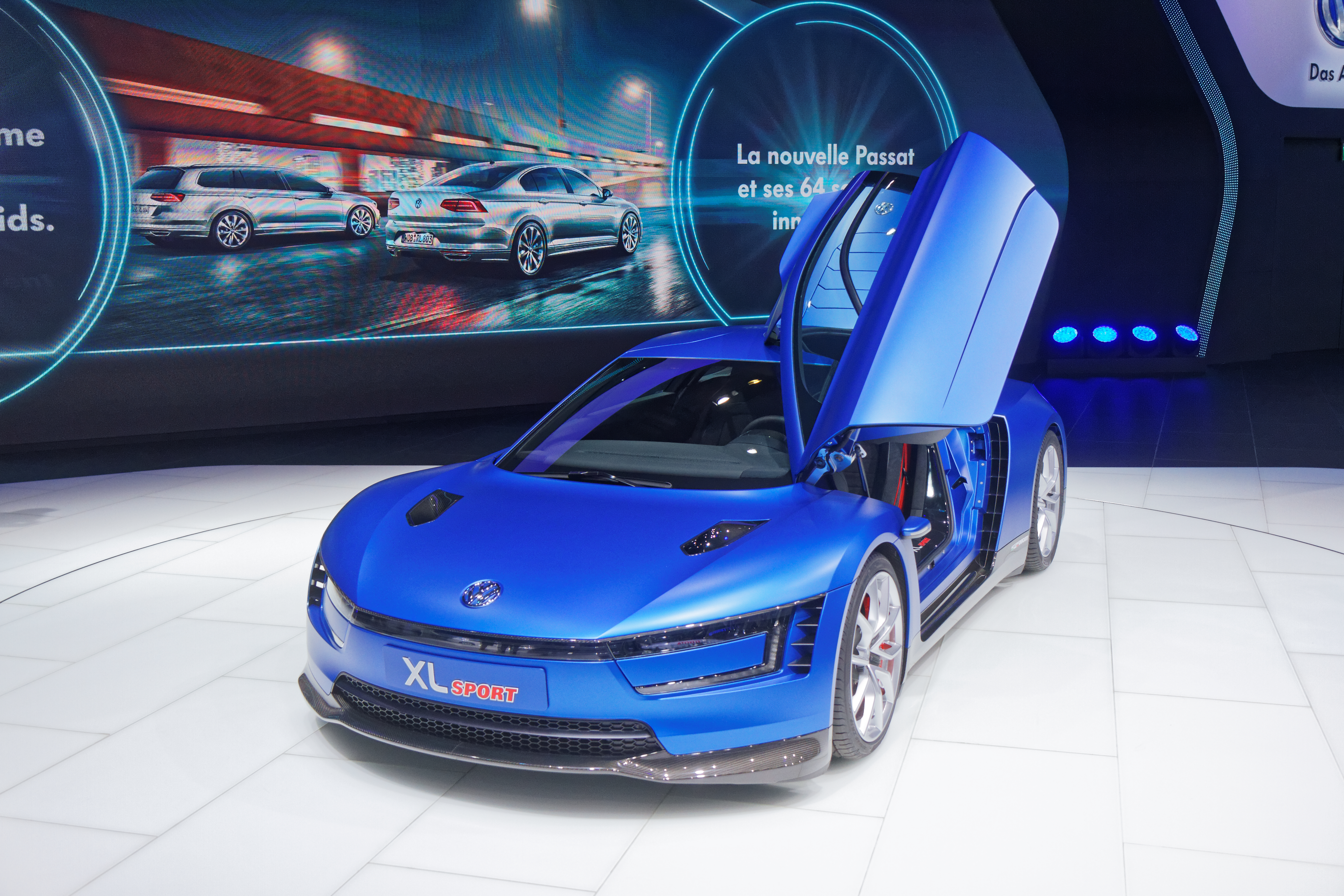 Une Volkswagen XL sport présentée lors du mondial de l'automobile de Paris 2014.